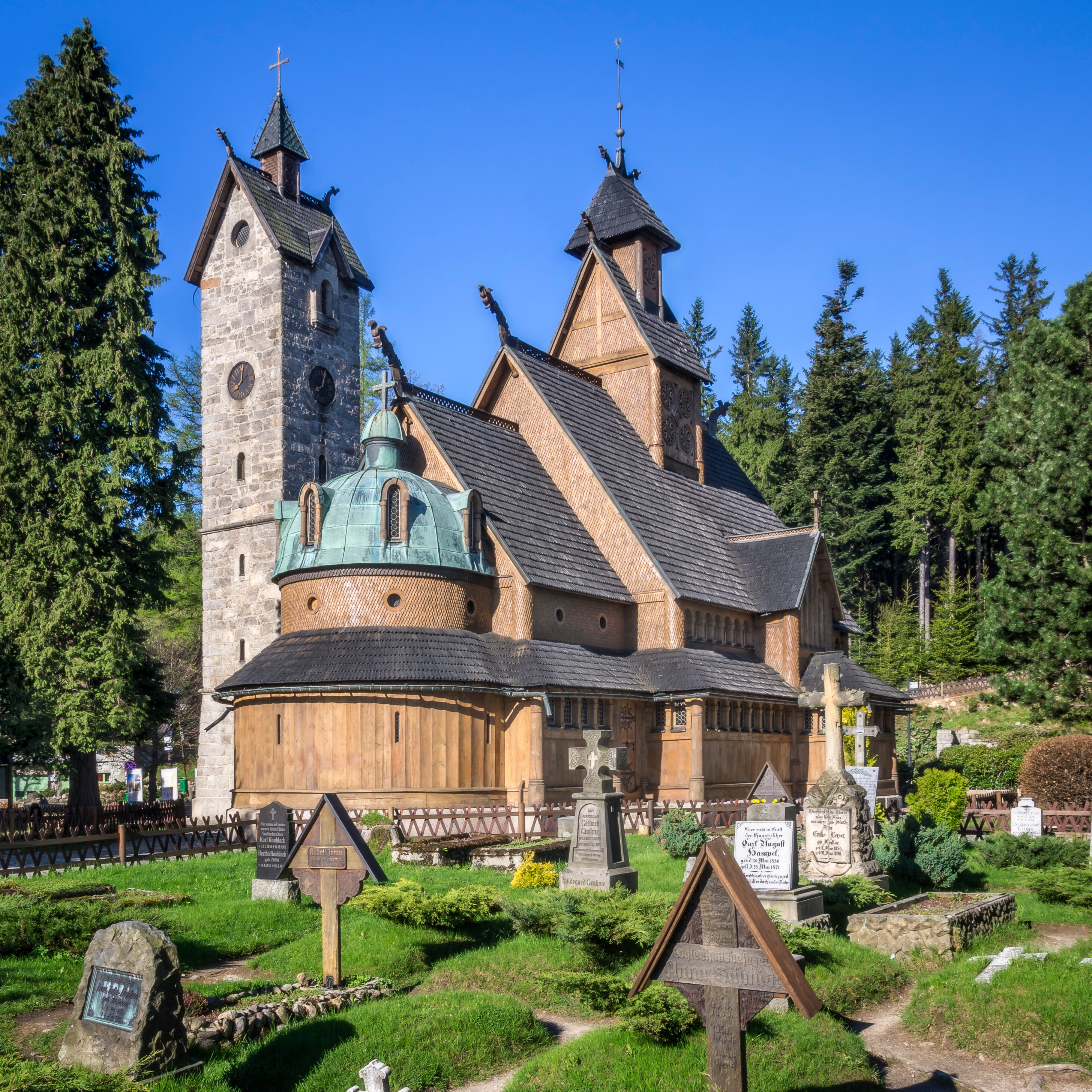 Karpacz, ul. Na Śnieżkę 8 - zespół kościoła Wang, XII, XX